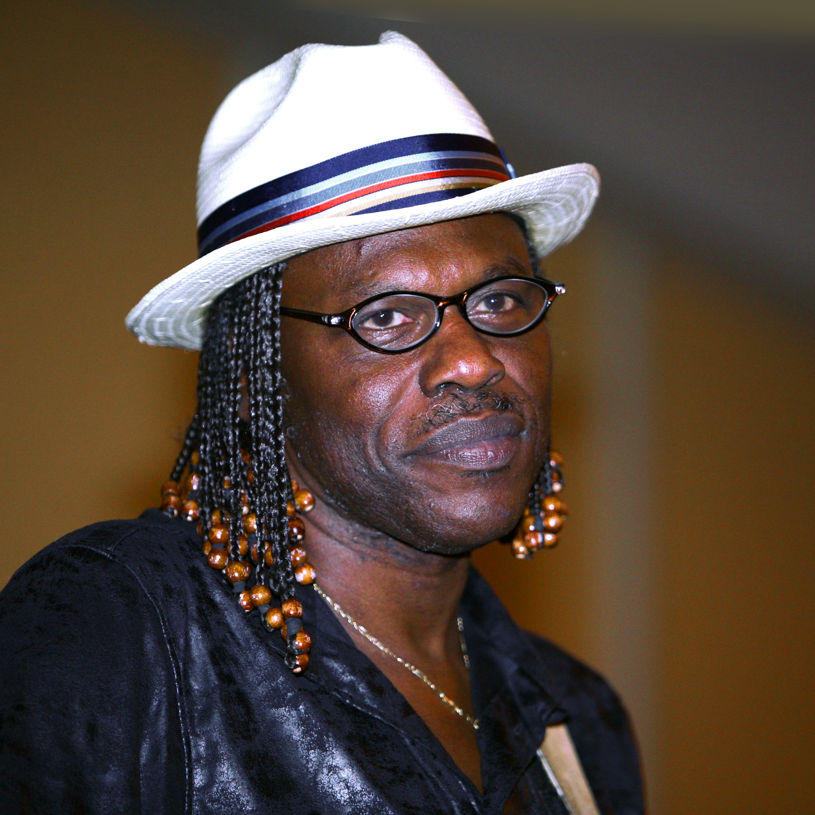 Joe Louis Walker